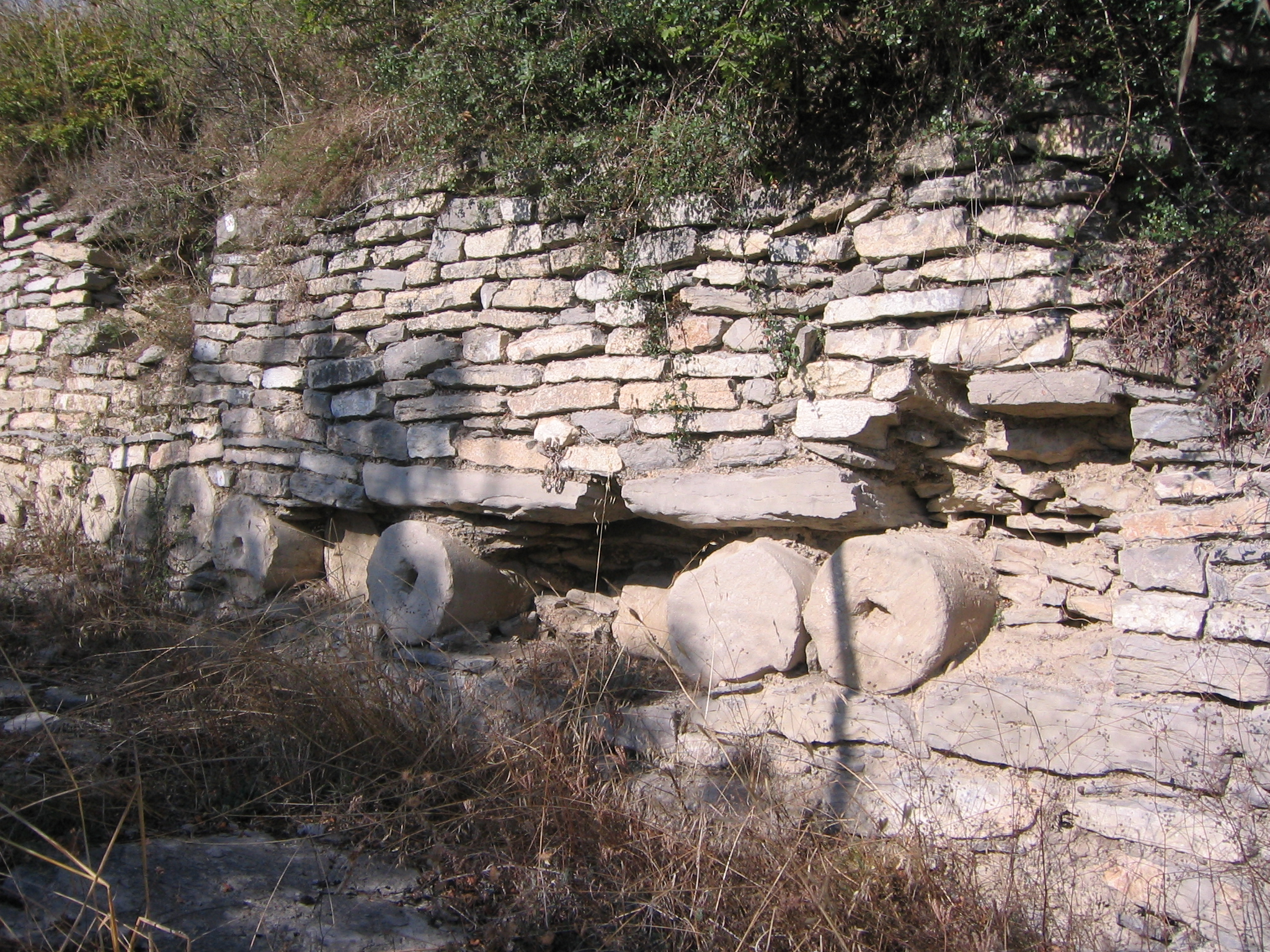 Detalle de la construcción de la muralla en Iruña Veleia. Álava, País Vasco (España).